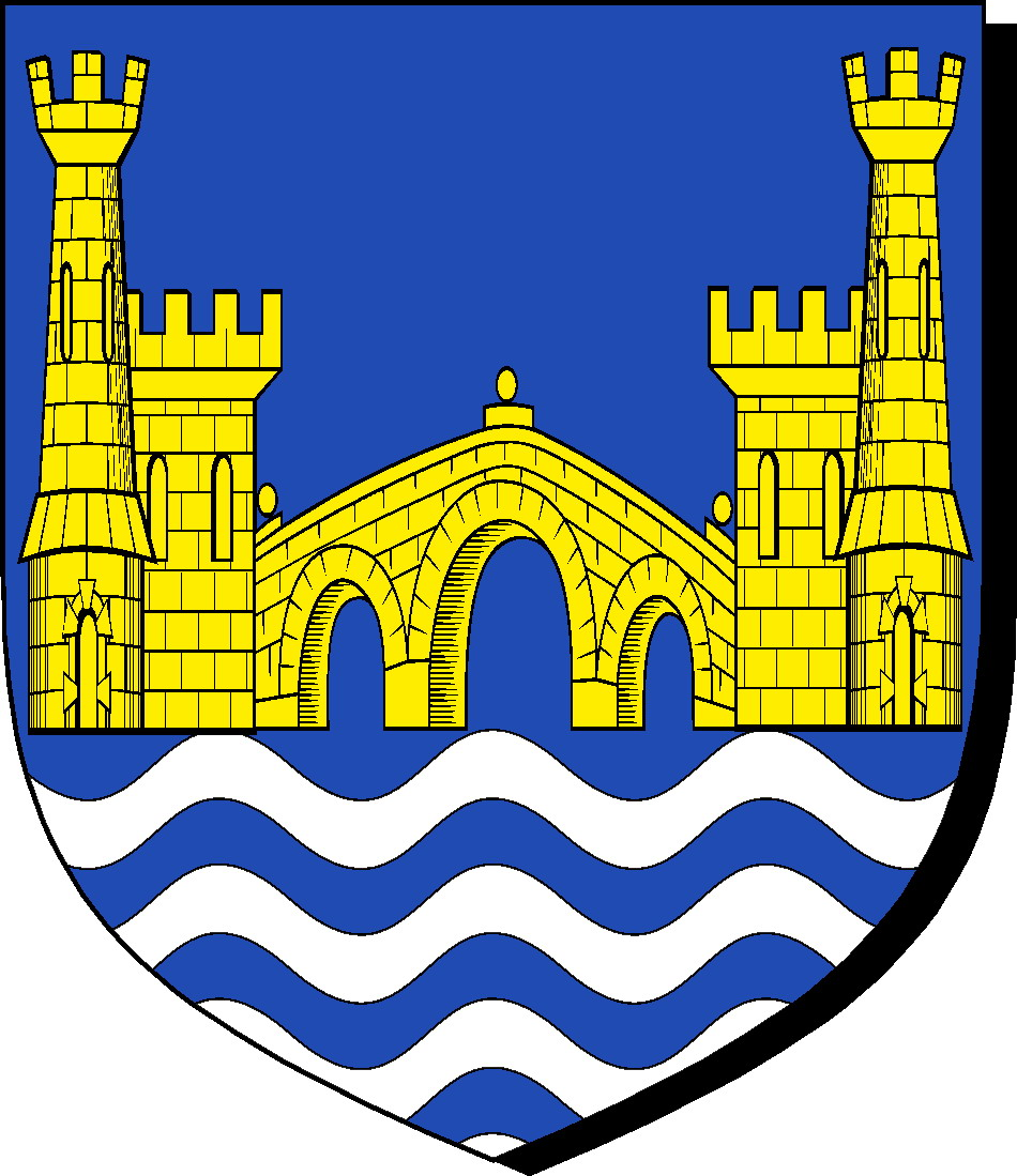 escudo libre en base a el libro cancion de hielo y fuego